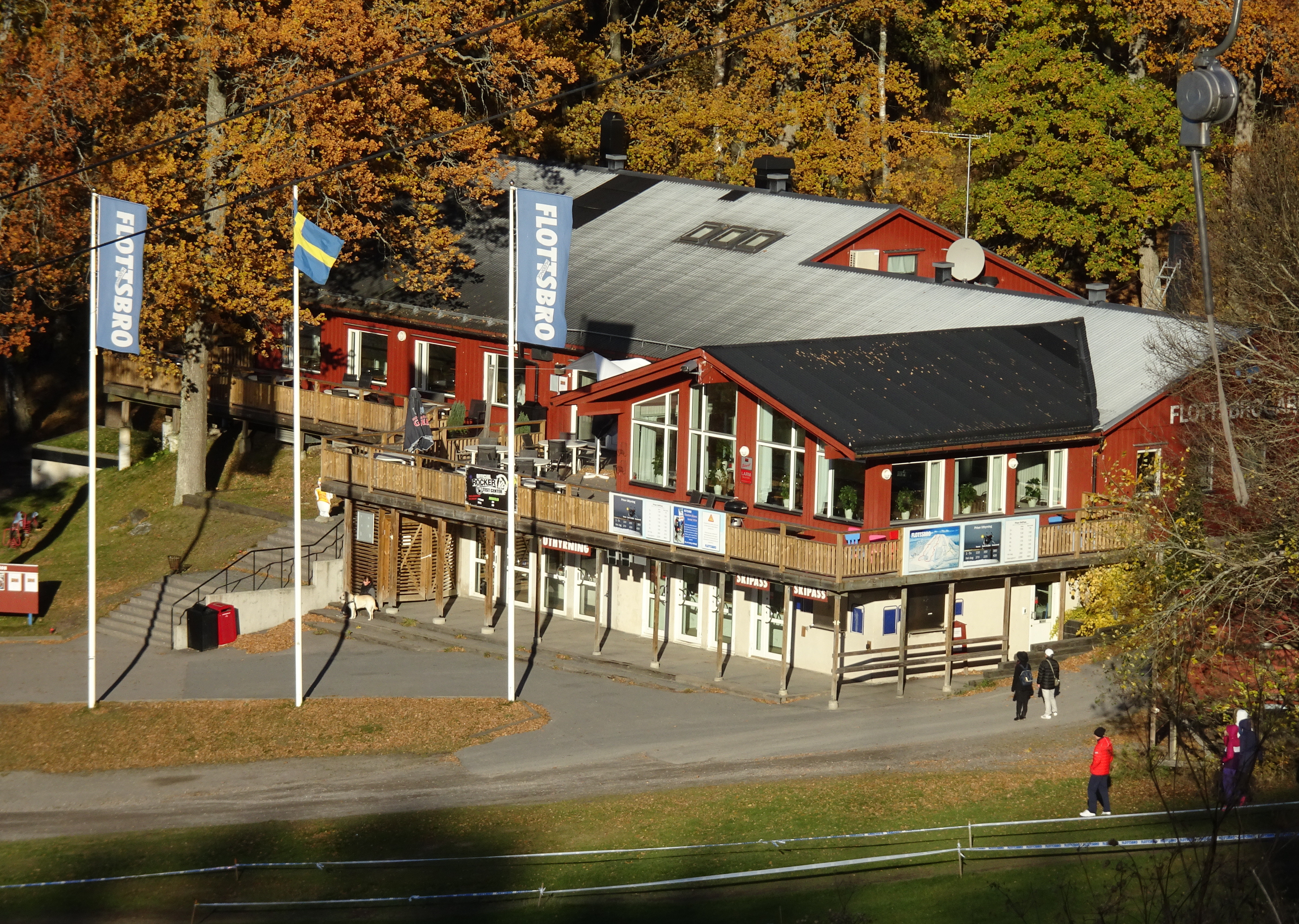 Flottsbrogården från Flottsbrobacken